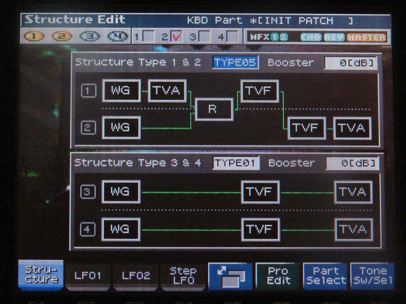 страница редактирования патча Fantom X